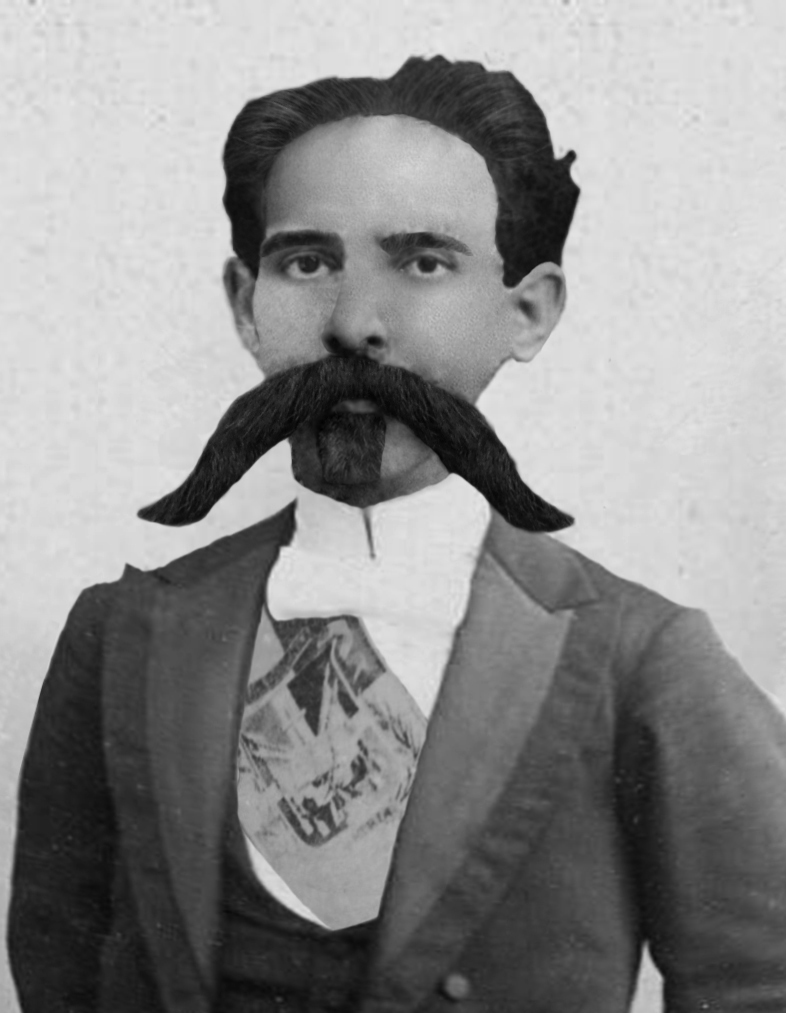 Cesareo Guillermo 1879